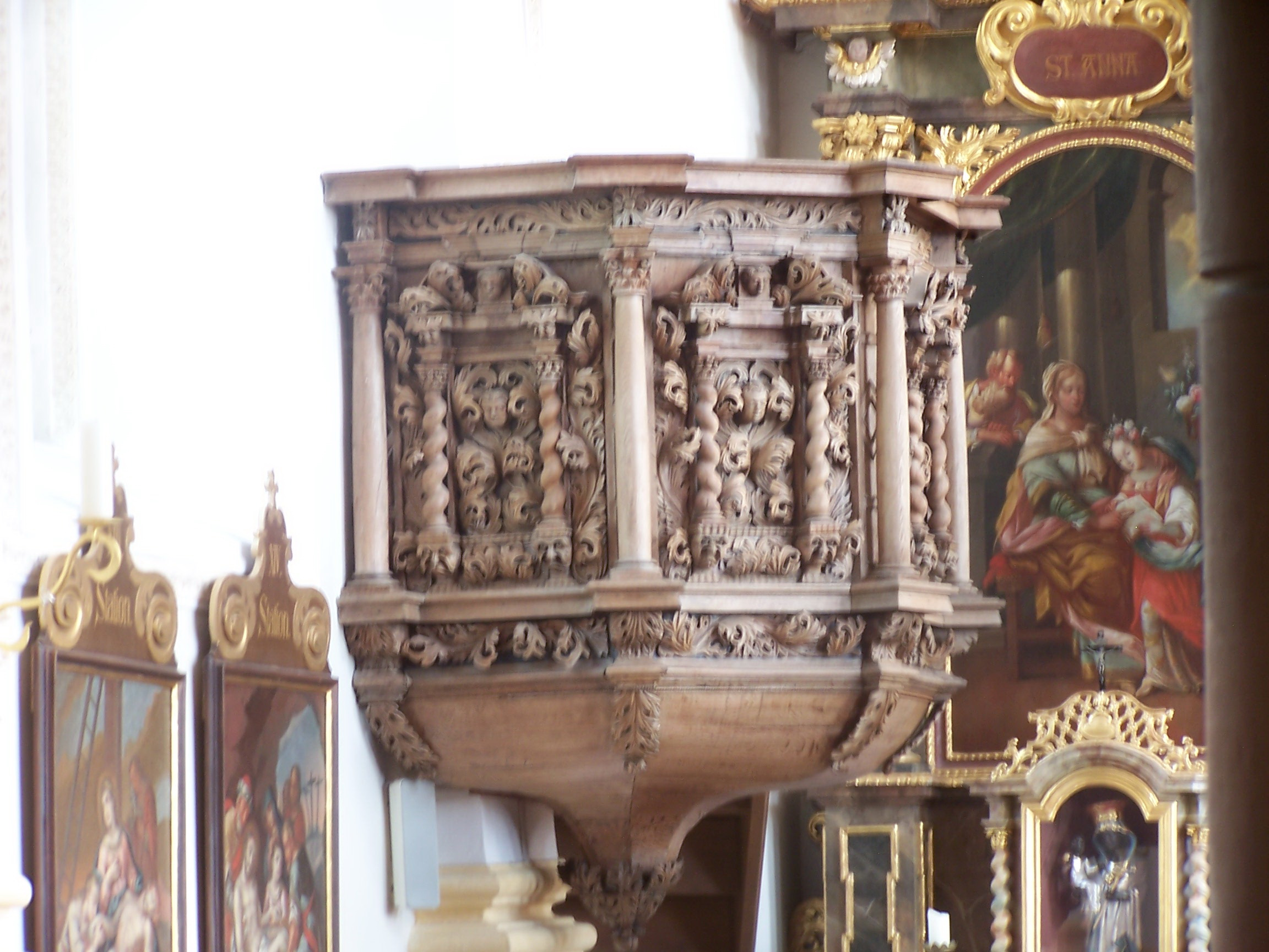 Oberglaim, Haus Nr. 46. Pfarrkirche Mariä Himmelfahrt. Saalkirche mit eingezogenem Chor und Westturm, erbaut 1694/97. Polygone Kanzel mit glatten und gedrehten Säulchen und reichlich Akanthusschnitzwerk, nach 1700 aus der Vorgängerkirche.